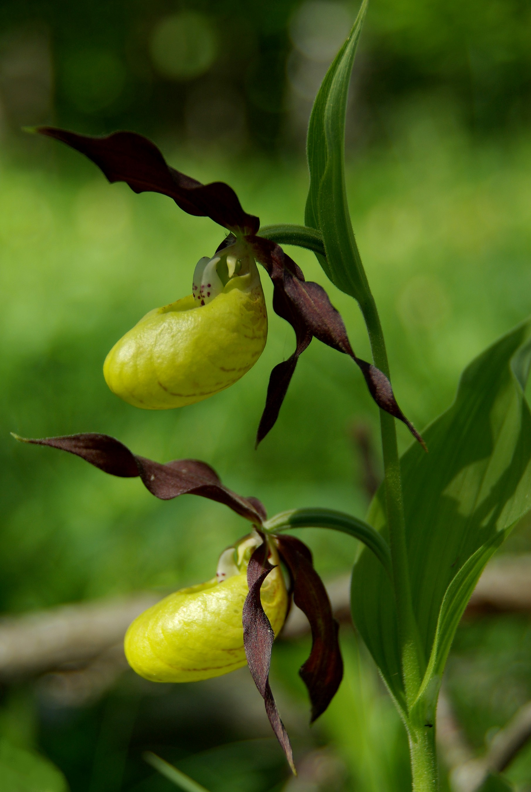 Kasvab tavaliselt puisniitudel, metsaservadel ja hõredamates kuuse-segametsades.Kuulub käpaliste sugukonda.See konkreetne kuldking on pildistatud Läänemaal Puhtus